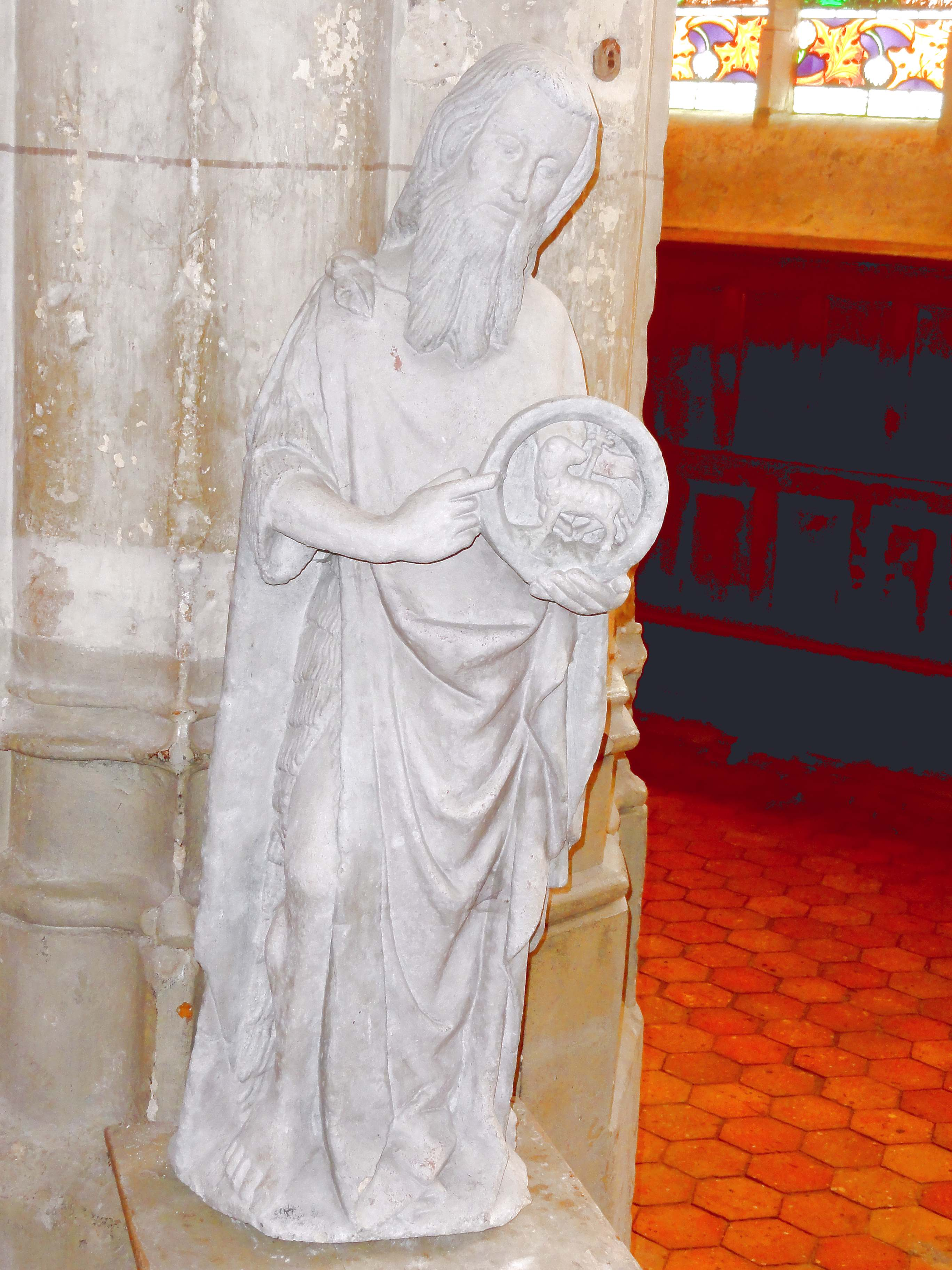 Statue de saint Jean-Baptiste, patron de l'église.